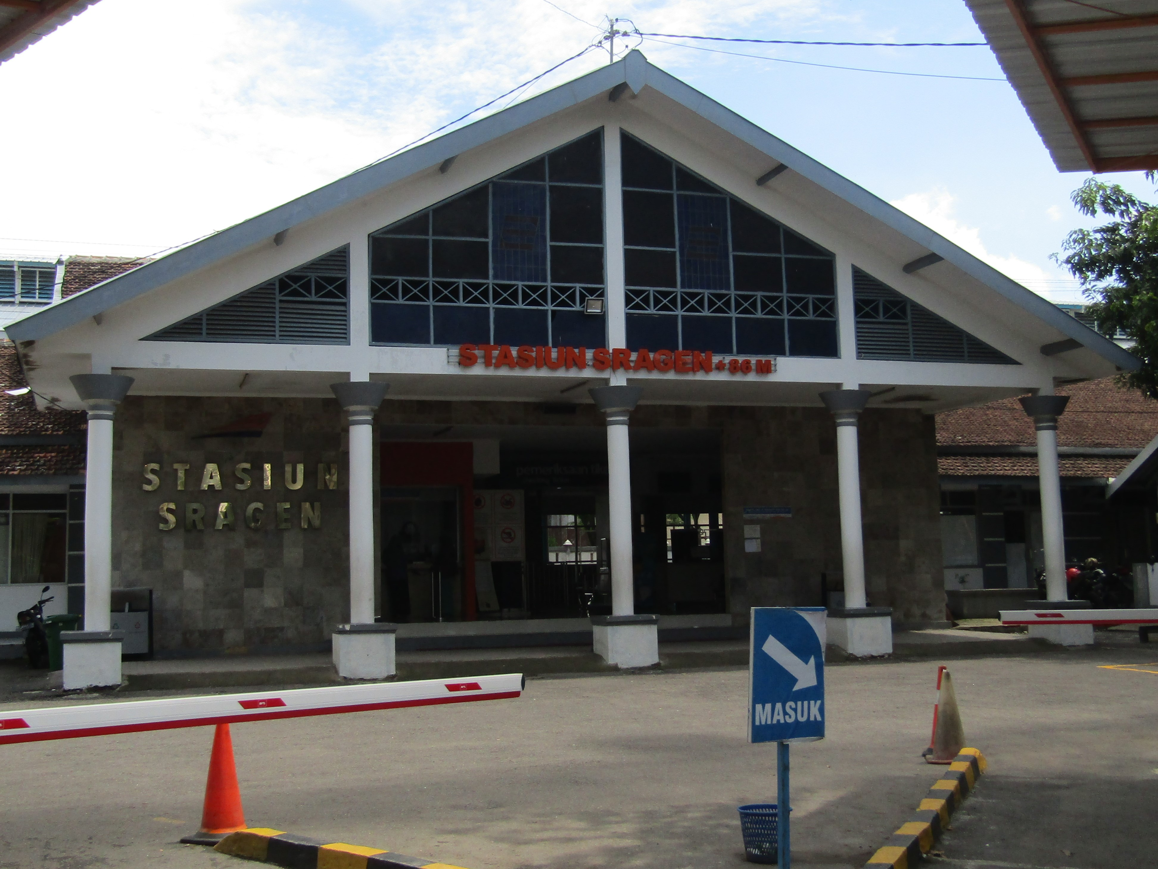 Tampak depan Stasiun Sragen, 2020